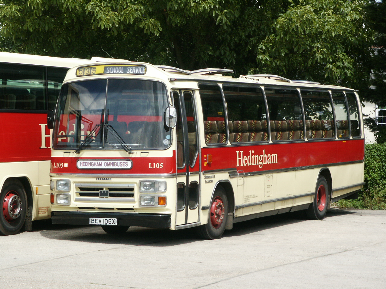 L105-BEV105X-2 270604 CPS